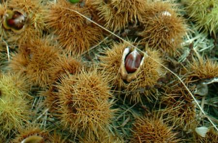 Esskastanien